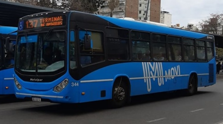 Interno 344 de la empresa Movi, prestando servicio en la línea 137